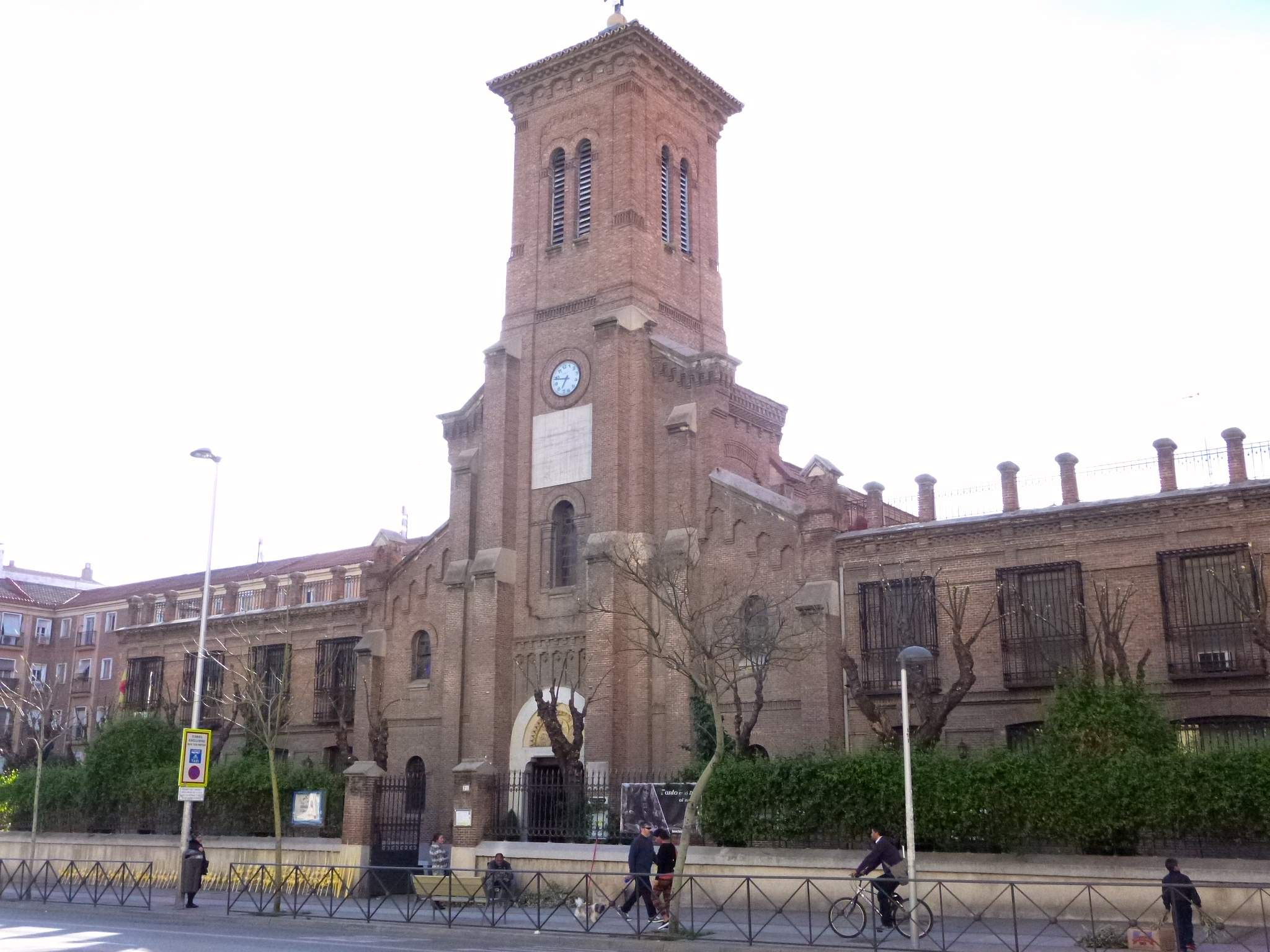 Iglesia de San Miguel Arcángel (Carabanchel, Madrid)